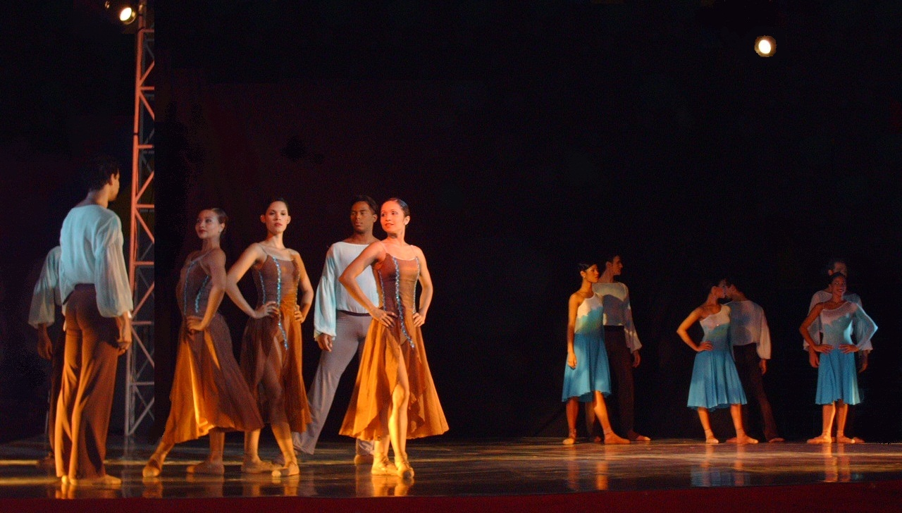 Ballet Nuevo Mundo de Caracas. "Oro, mar y sangre", coreografía de Brixio Bell. Septiembre de 2011.